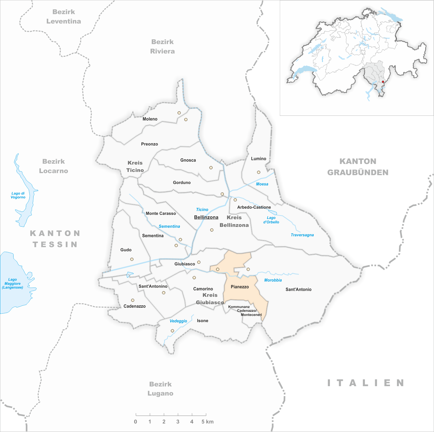 Municipality Pianezzo